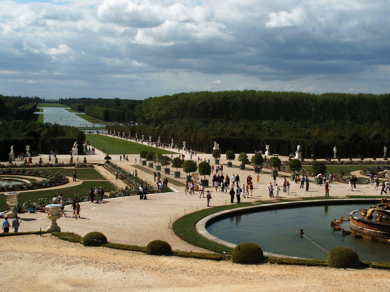 Garten des Schlosses in Versailles (bei Paris), Frankreich. Blick von der Parterre d'Eau genannten Terrasse gen Westen. Sichtachse mit Becken der Latona, Rasenteppich, Becken des Apollo und grossem Kanal.